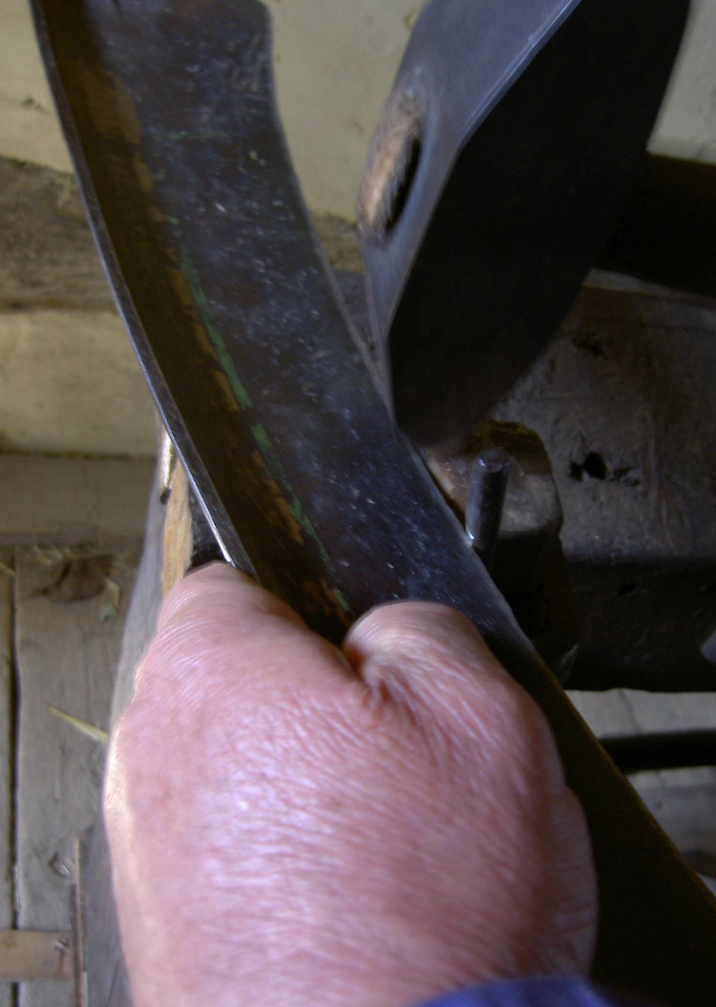 Beim maschinellen Dengeln entsteht ein sehr schmaler Dengel